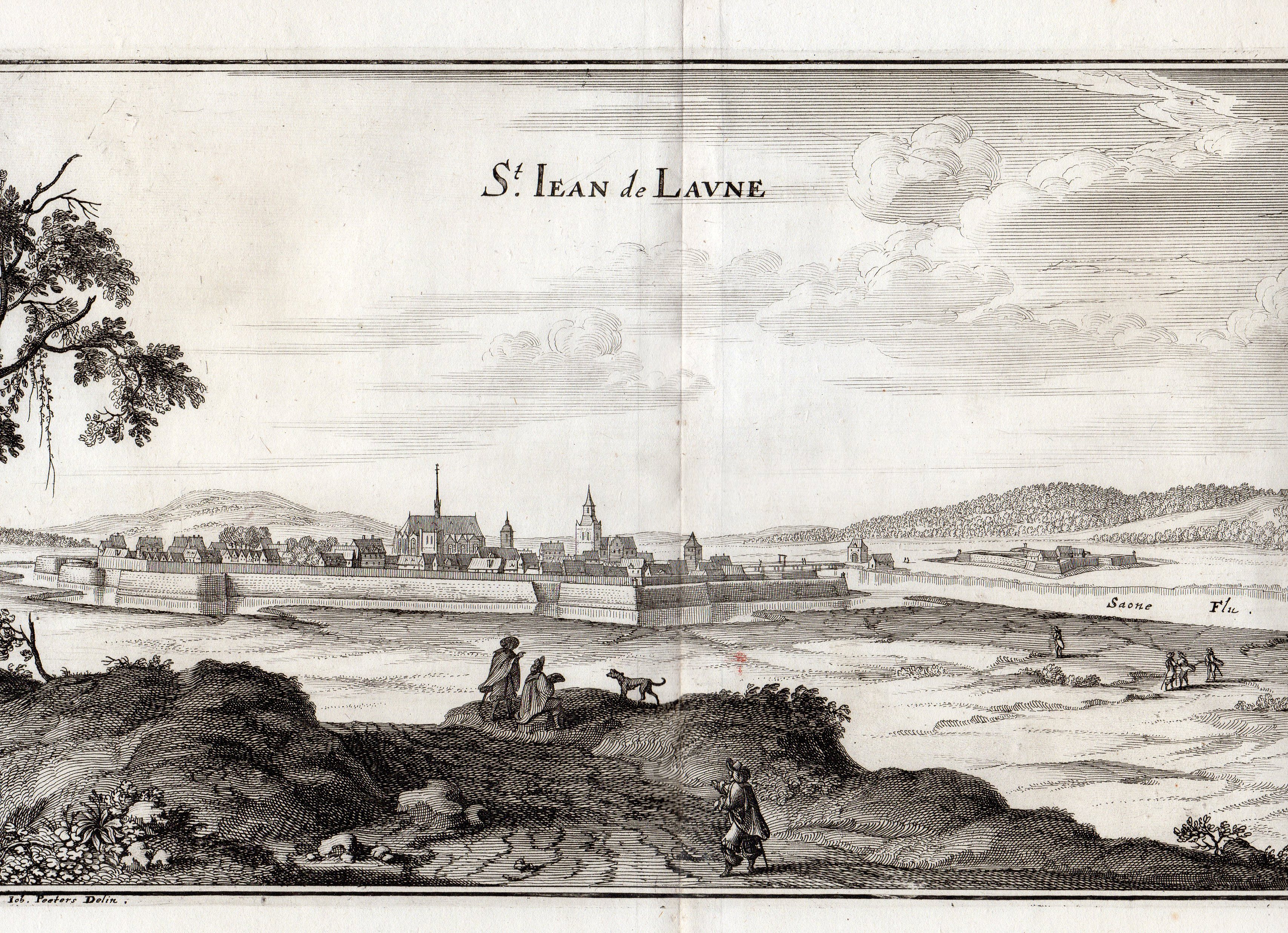 gravure représentant Saint-Jean-de-Losne d'après Jan Peeters